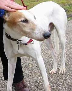 Greyhound, Foto gemacht und zur Verfügung gestellt von Fantasy :-)